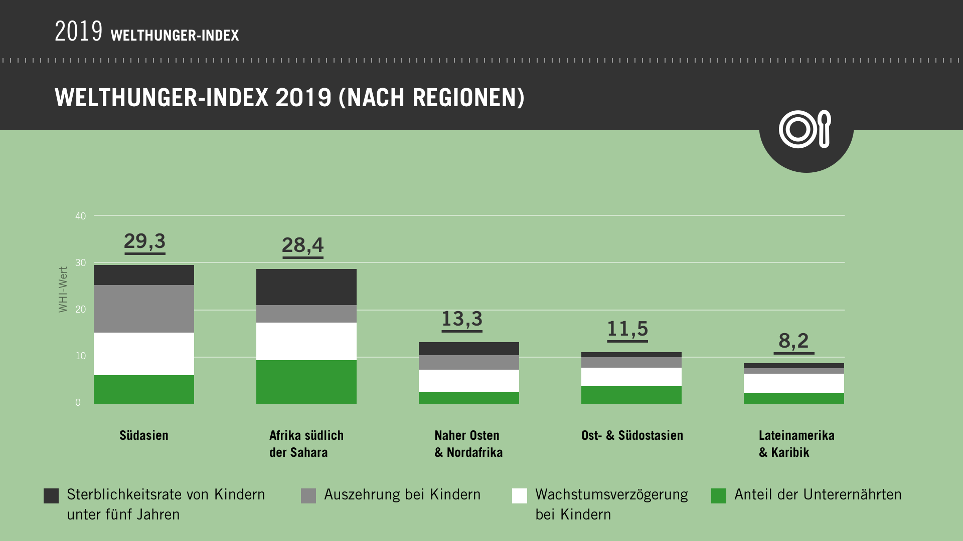 Regionale WHI-Werte